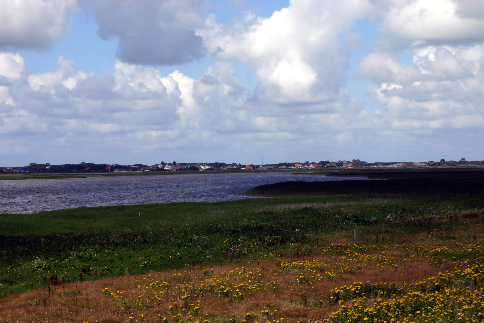 Søndervig, Denmark, Panorama View